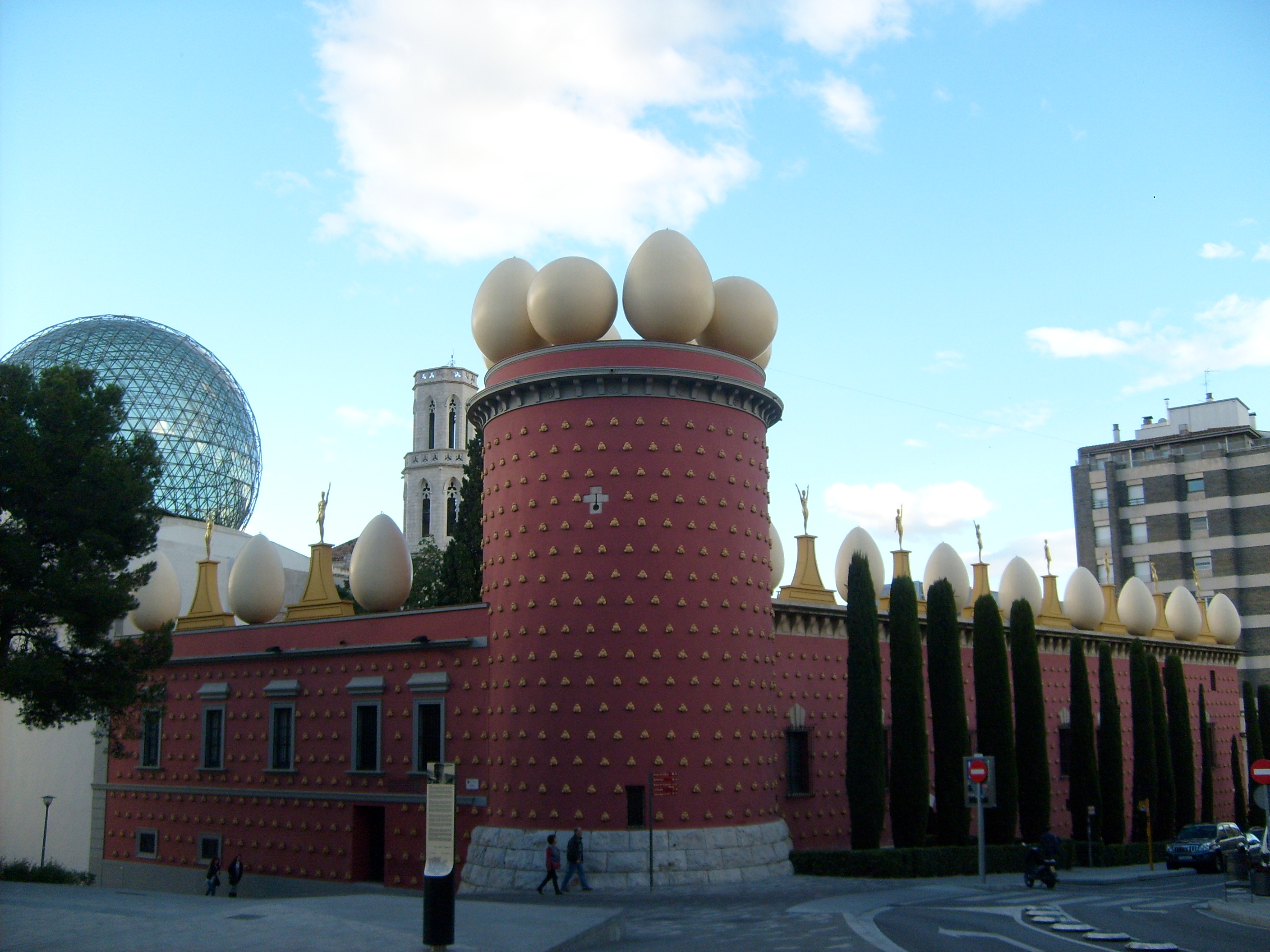 A famous museum of Salvador Dalí.